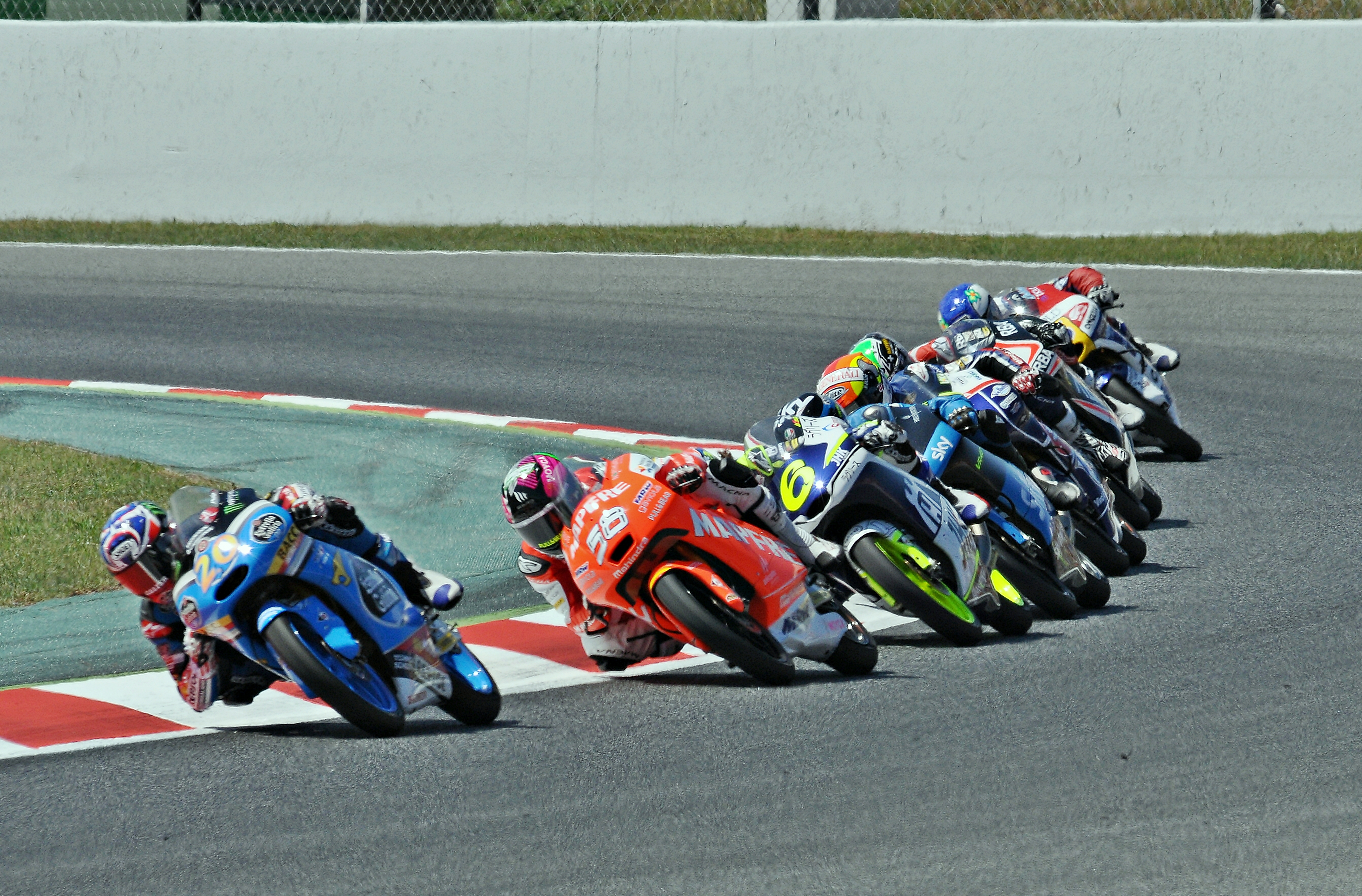 gran premio de cataluña